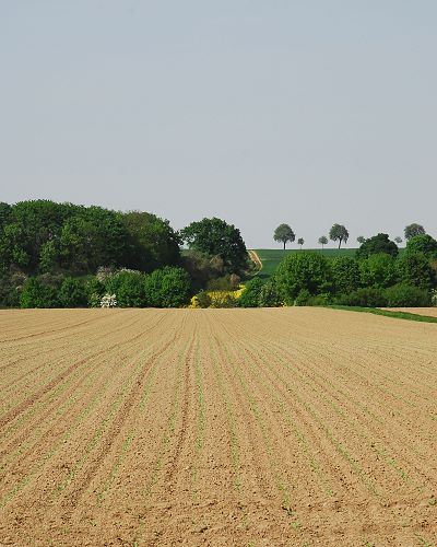 Blick ins Erkelenzer Land bei Lövenich. Im Tal fließt der Nysterbach.